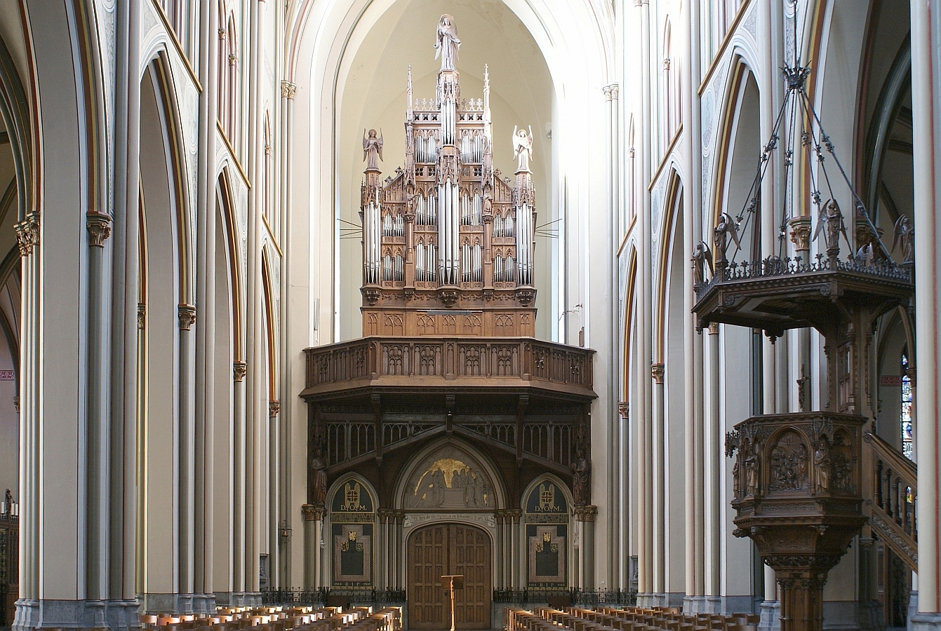 Sint-Vincentiuskerk (Eeklo) - Schip, Orgel en preekstoel